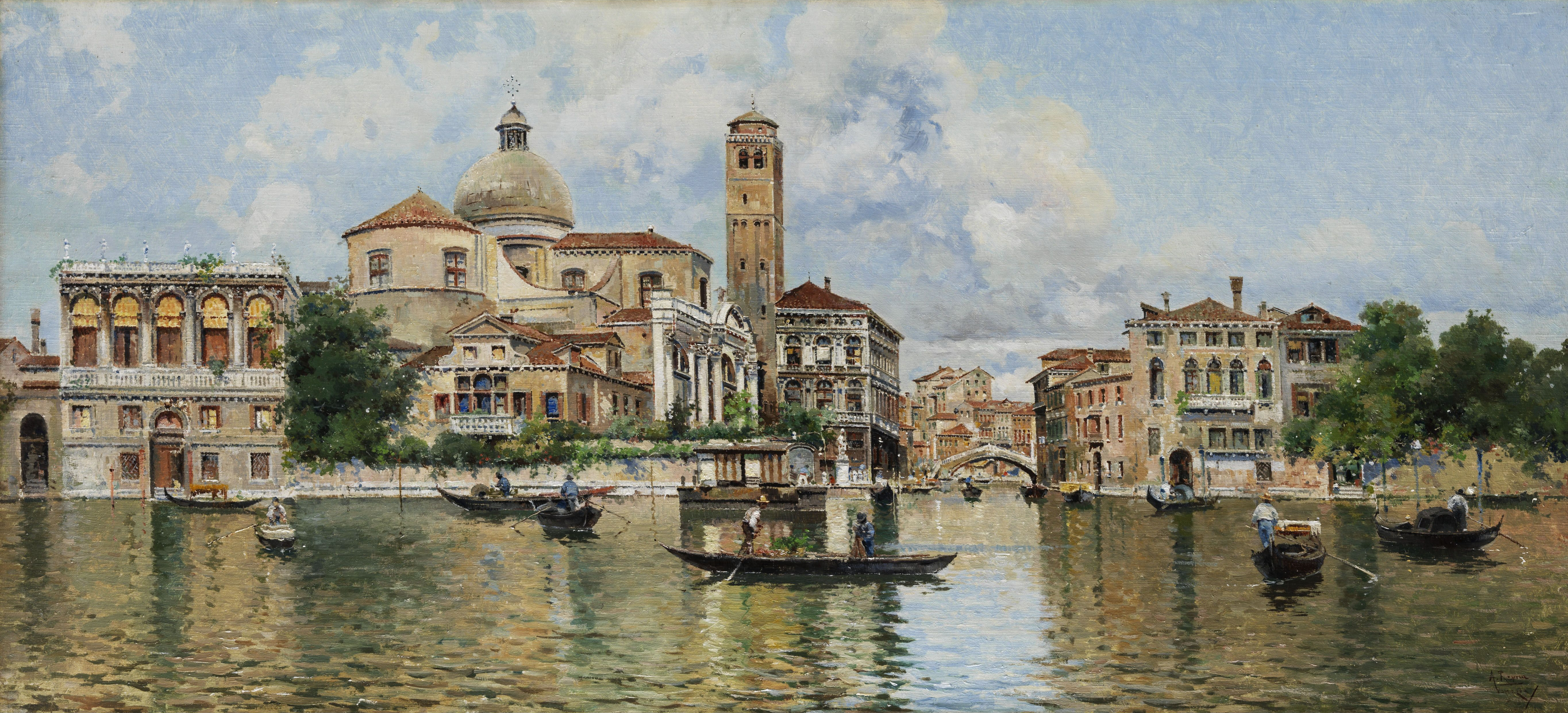 Vedute von Venedig. Öl auf Leinwand. 34,5 x 74,5 cm. Signiert.